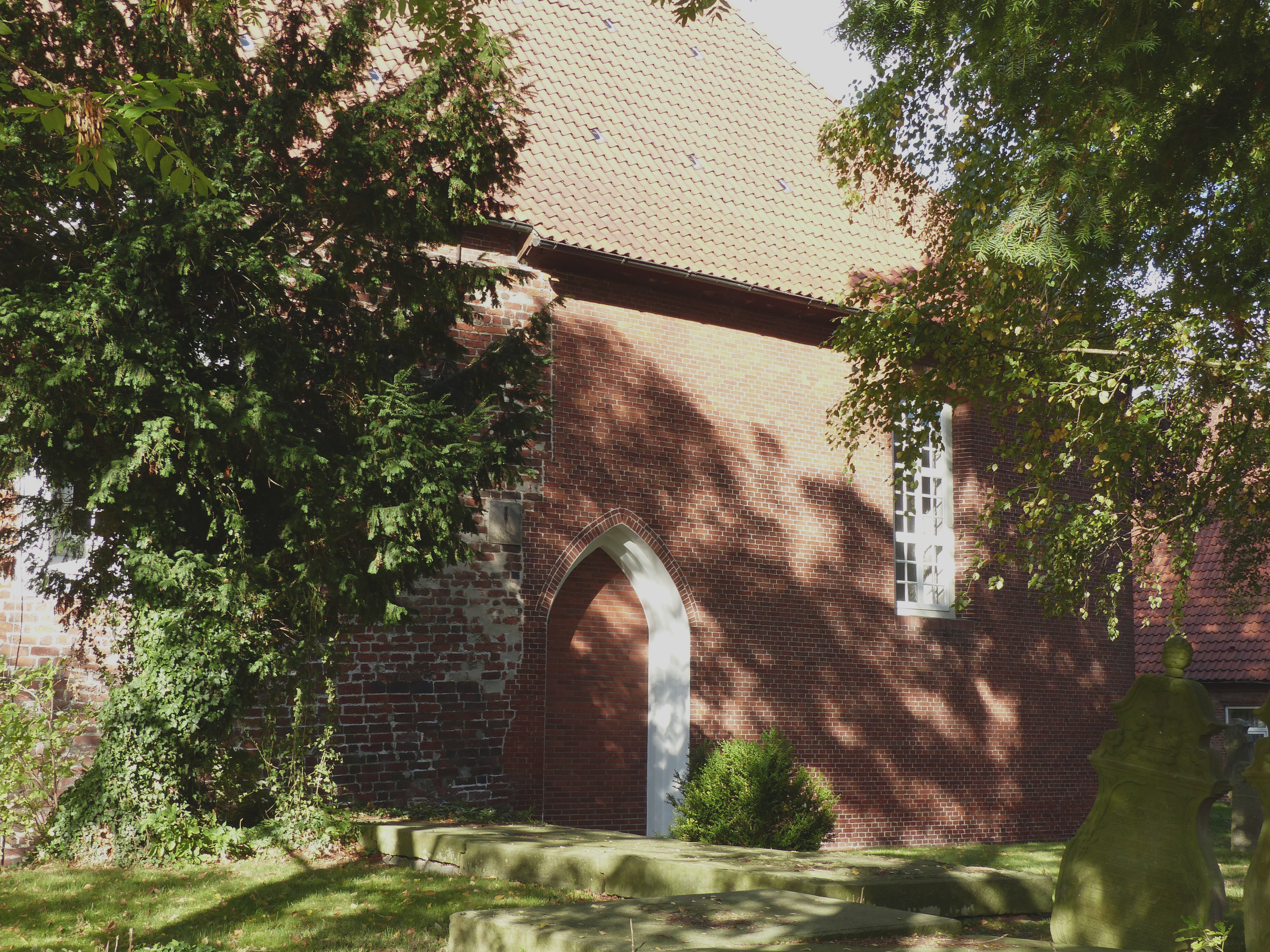 Kirche Dedesdorf, neugotische Erweiterung des Schiffs nach Osten von 1838